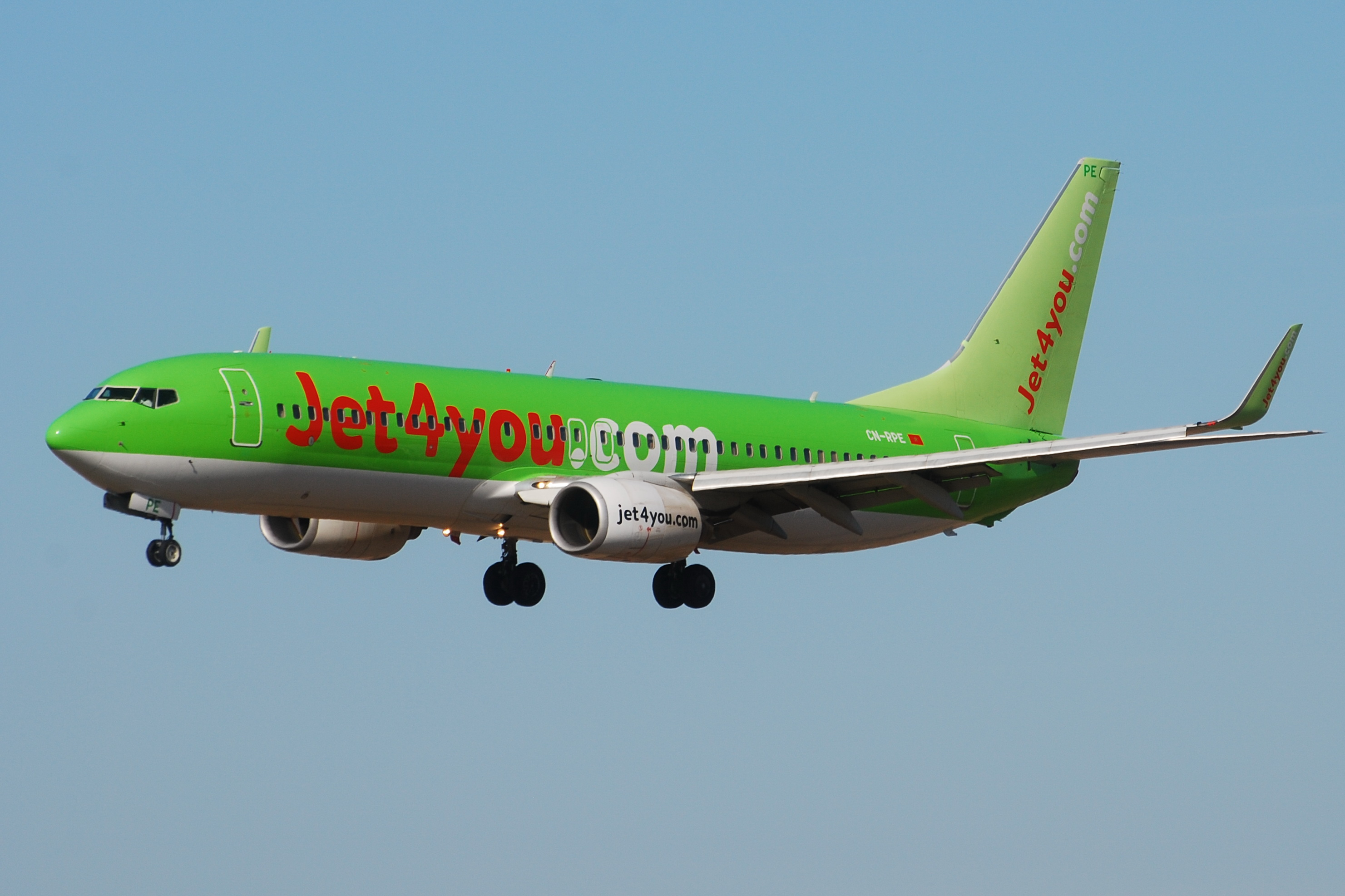 Photo prise à l'aéroport de Toulouse-Blagnac (LFBO) en France. Picture take at Toulouse-Blagnac Airport (LFBO) in France.